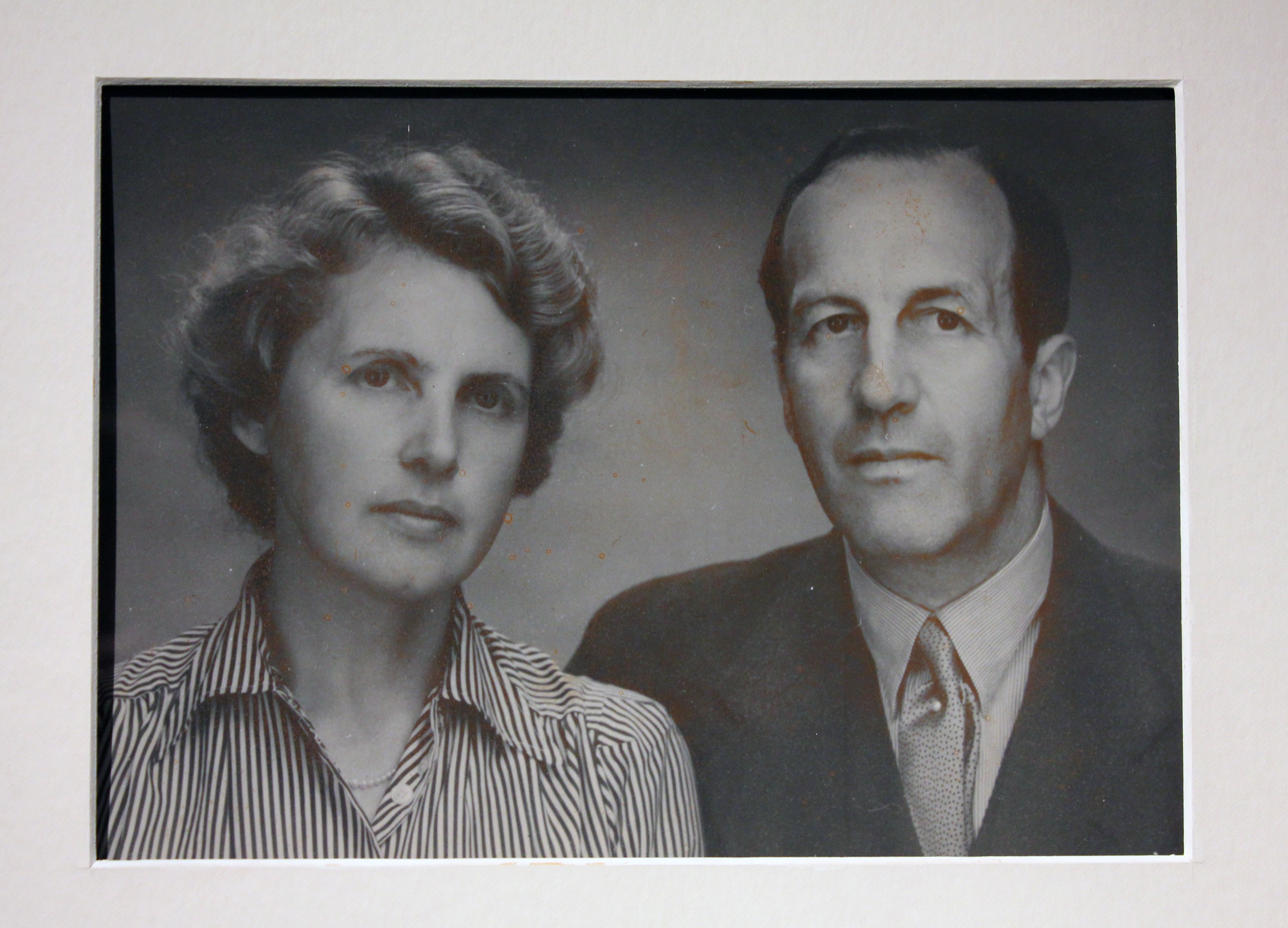 Portrettfoto Borghild og Carl Hammerich